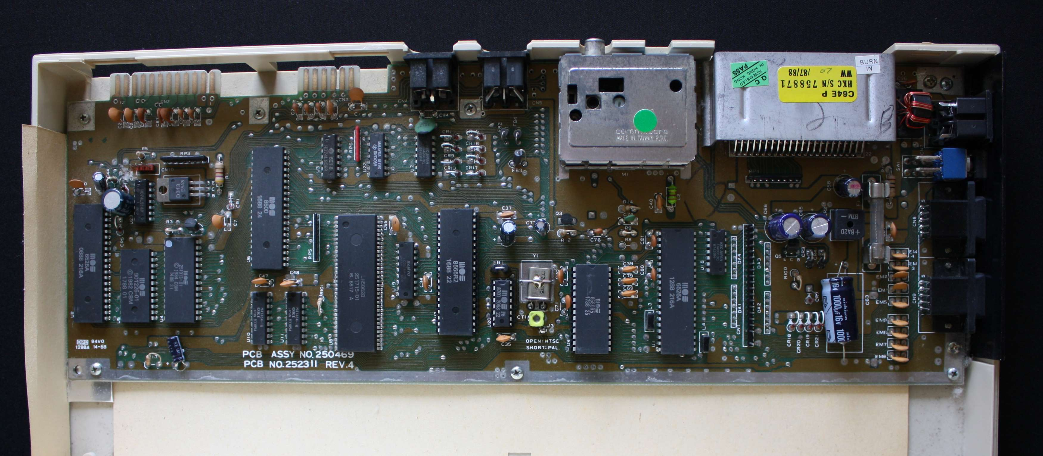 Intern billede af Commodore 64 hjemmedatamat fra firserne.